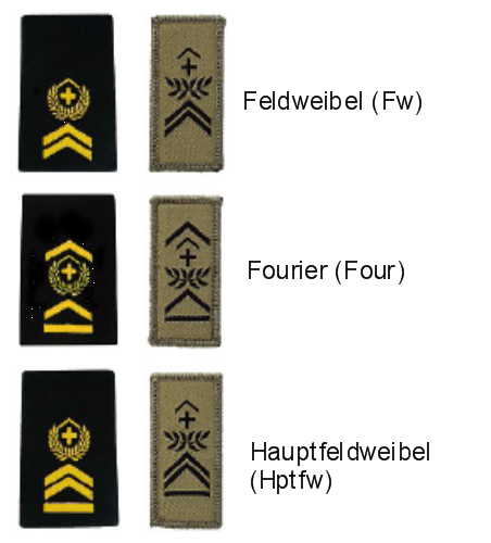 Schweizer Armee - Gradabzeichen Höhere Unteroffiziere